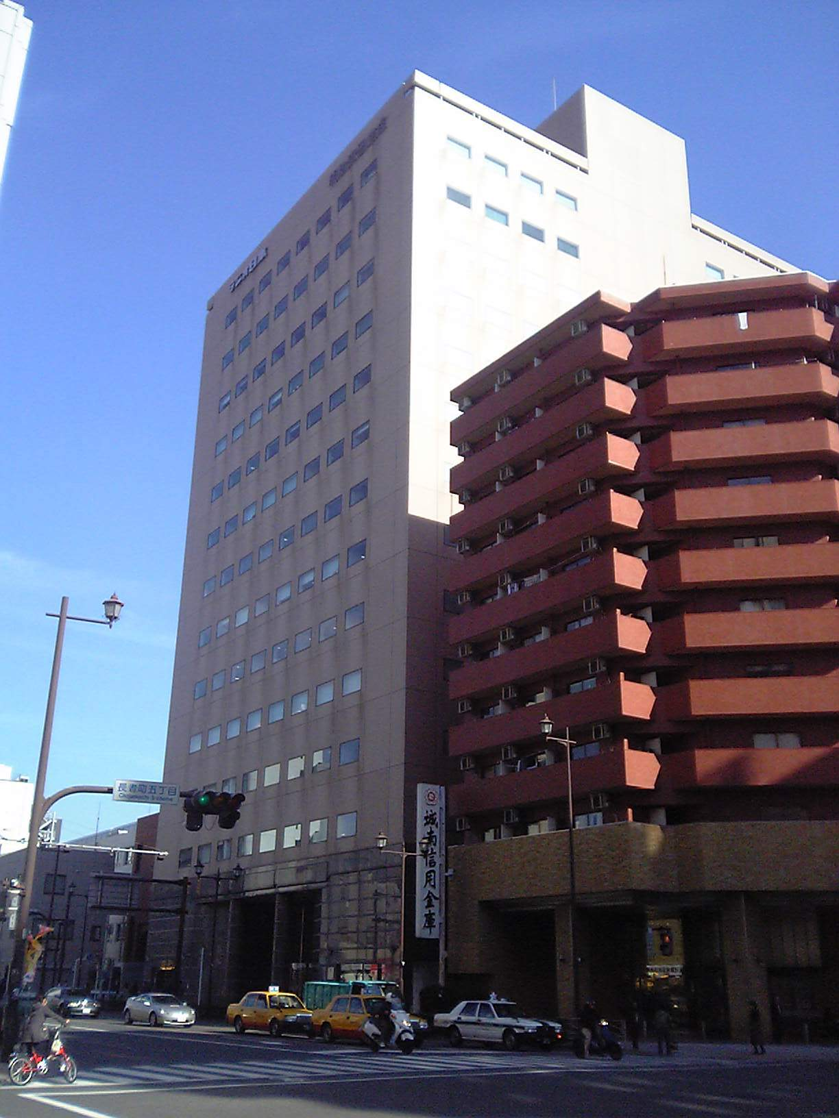 アール・エフ・ラジオ日本の本社所在地になっている明治安田生命ラジオ日本ビル(2009/11/04撮影)